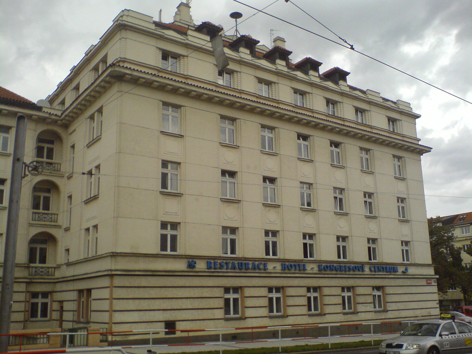 Česky: Masarykova kolej ČVUT v Dejvicích